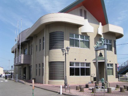 2005年3月31日に投稿者が門川駅にて撮影。